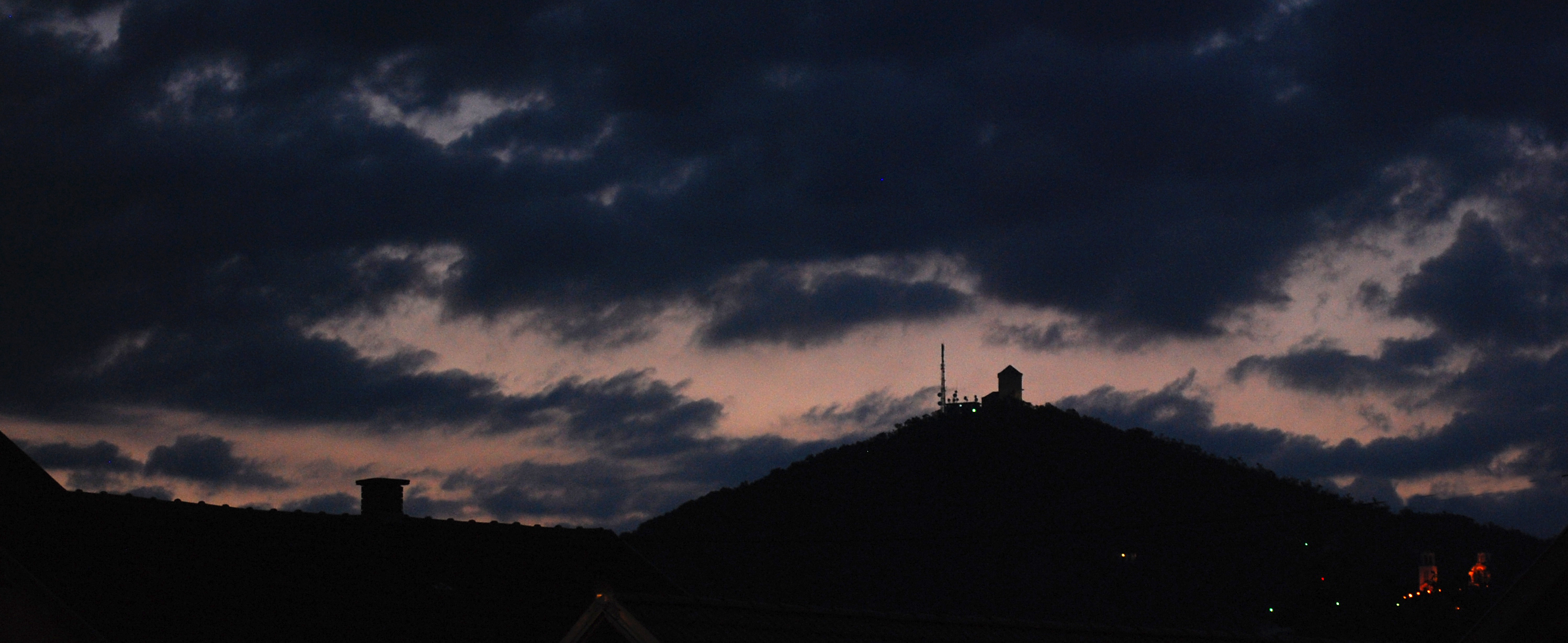 Вршачки брег са Кулом